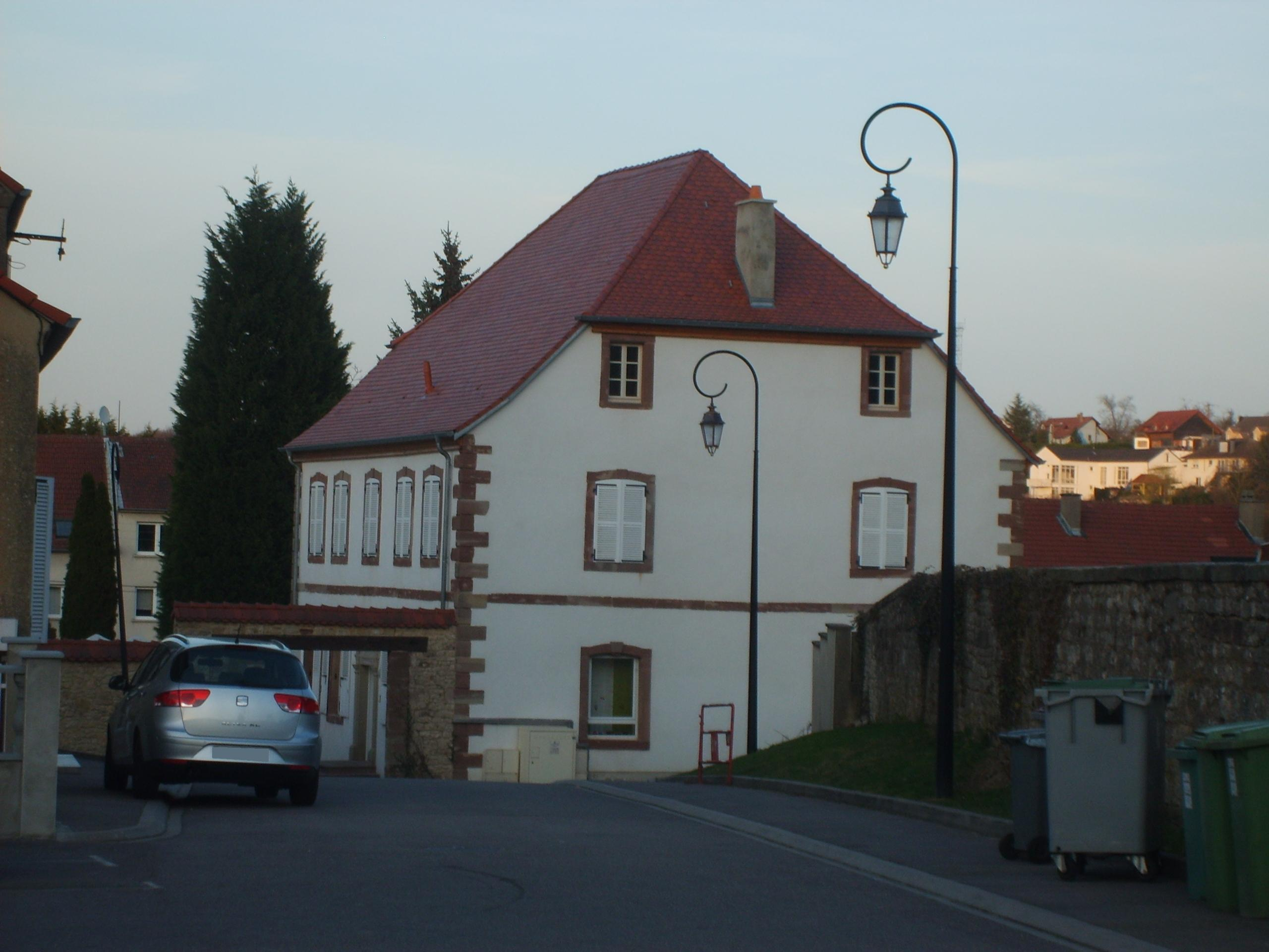 Ancien presbytère catholique d'Alsting, Moselle.